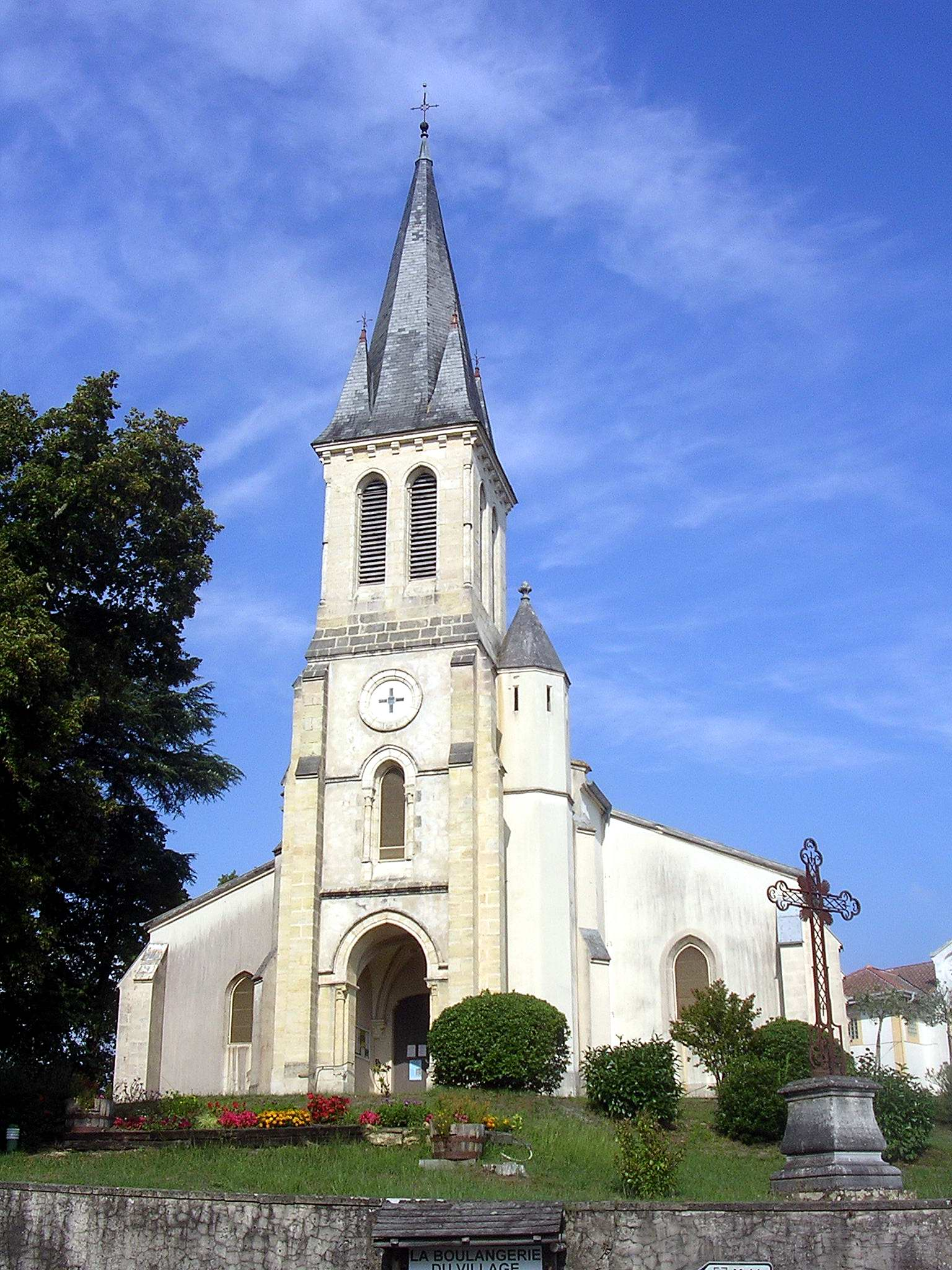 Eglise Saint-Jean-Baptiste d'Onesse-et-Laharie, dans le département français des Landes